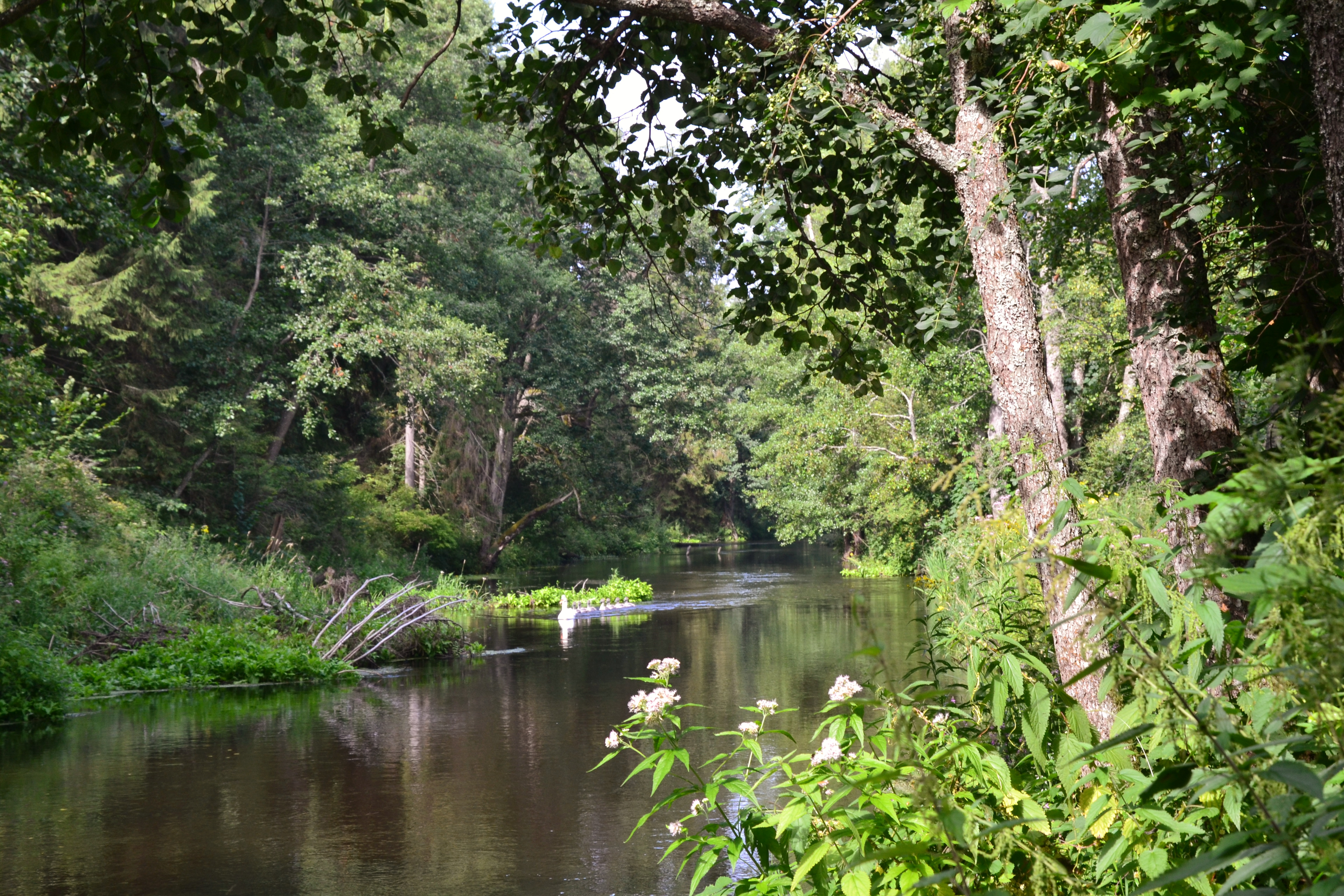 Šalčia Rūdninkų girioje